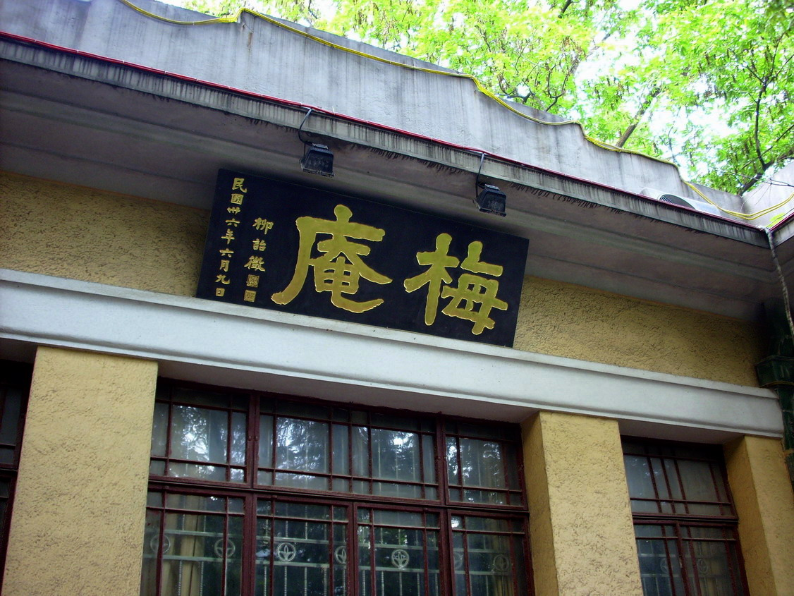 东南大学校园内的梅庵